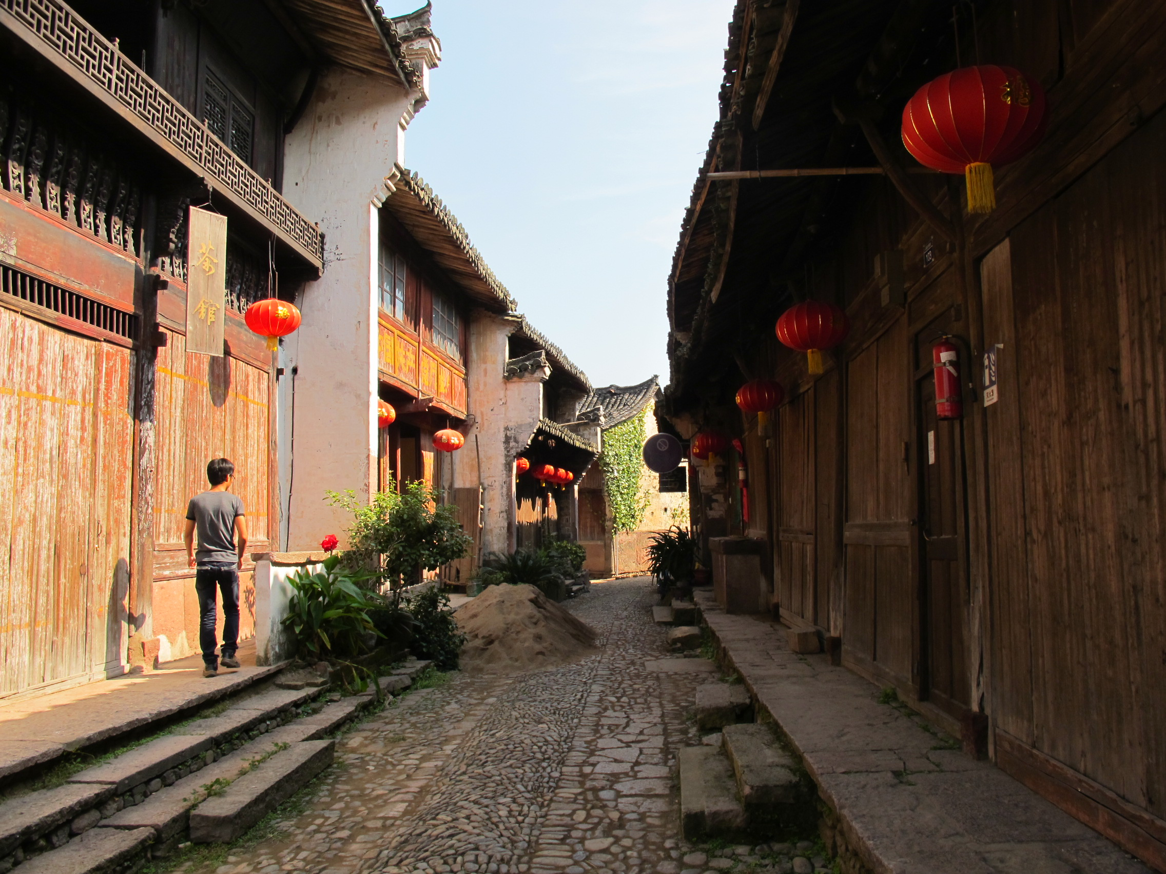 皤滩古街